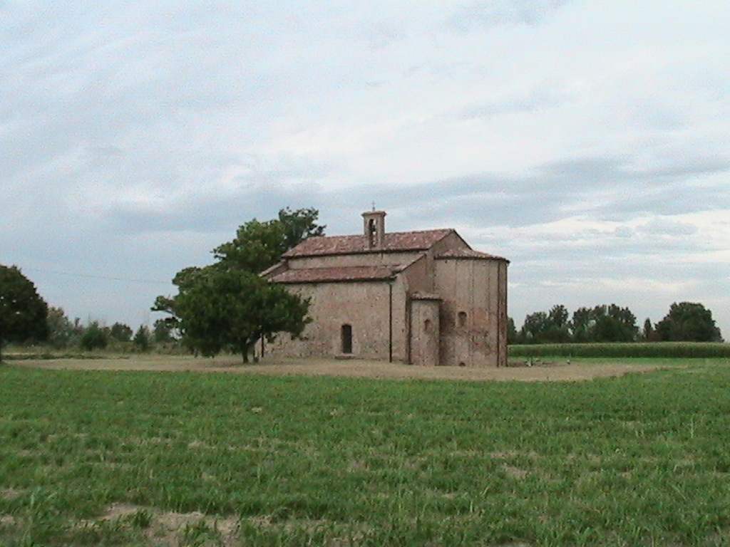 San Secondo Parmense - Pieve di San Genesio - Sec. XI - XIII